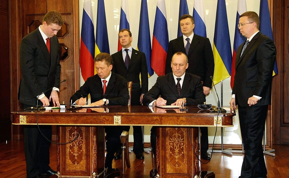 Председатель правления ОАО «Газпром» Алексей Миллер (слева) и глава правления НАК «Нафтогаз Украины» Евгений Бакулин (справа) подписали дополнения к контрактам об условиях купли-продажи и транзита российского газа в 2009–2019 годах.